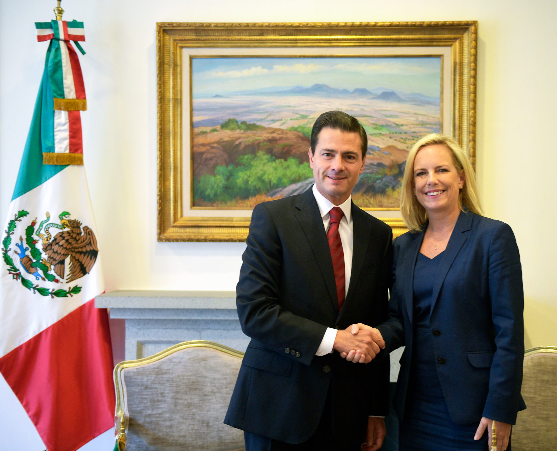 El Presidente Enrique Peña Nieto se reunió con la Secretaria de Seguridad Interna de Estados Unidos, Kirstjen Nielsen, quien reconoció el trabajo conjunto de ambos países en materia de seguridad, migración, cooperación regional y asuntos fronterizos.